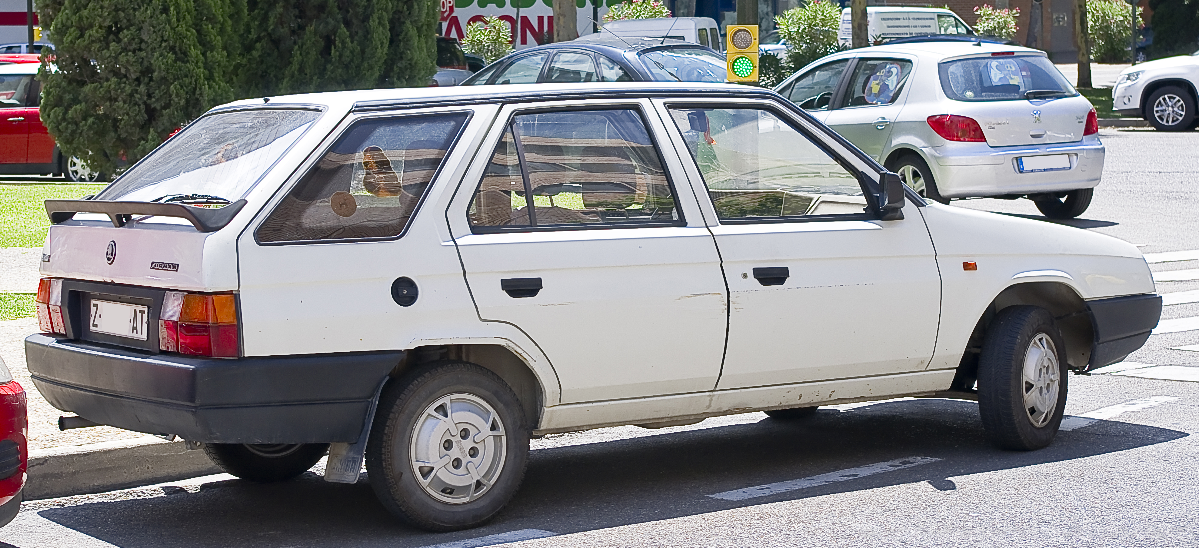 1992 Škoda Forman